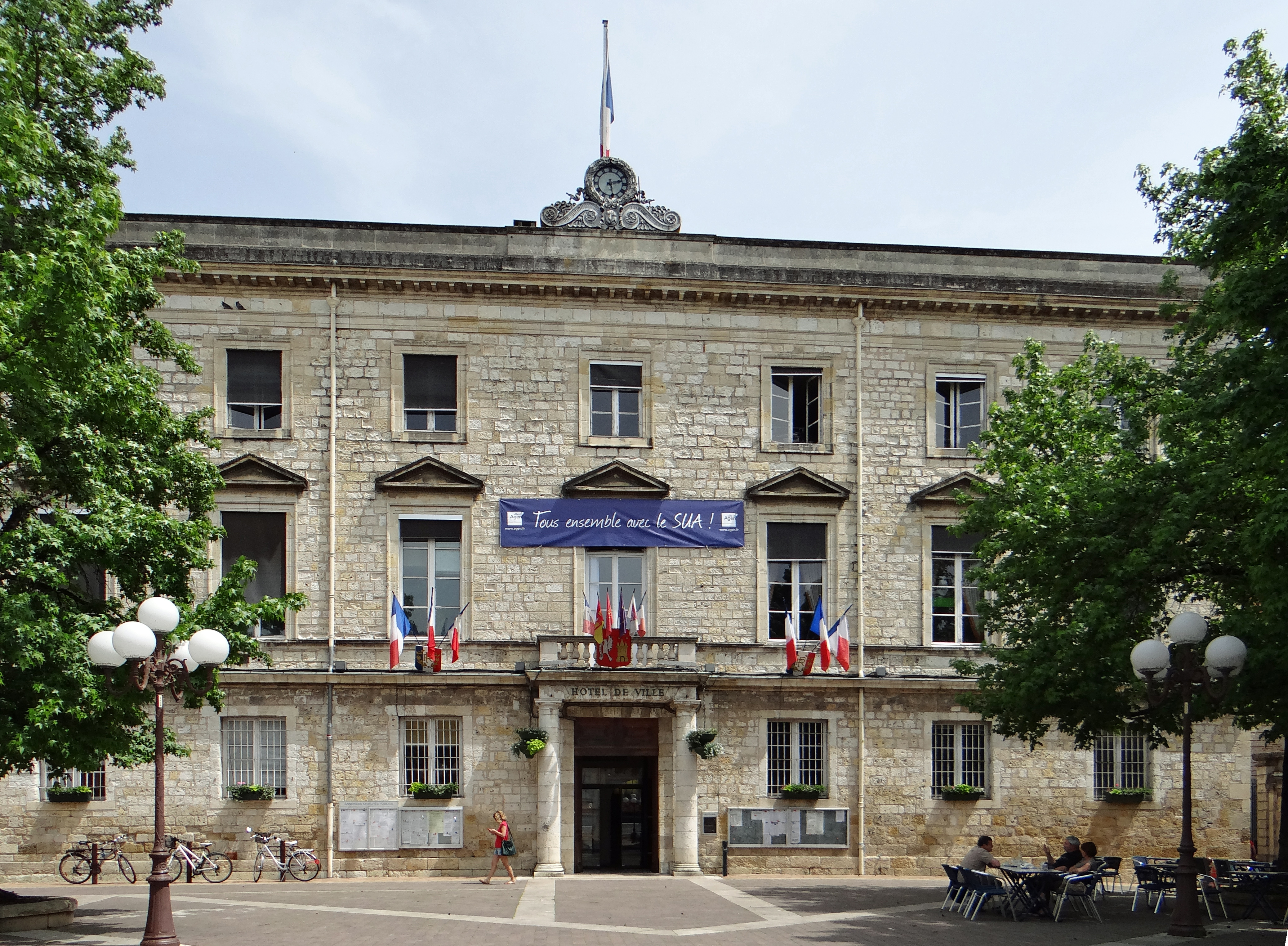 Agen - Hôtel de ville - Façade sur la place du docteur Esquirol